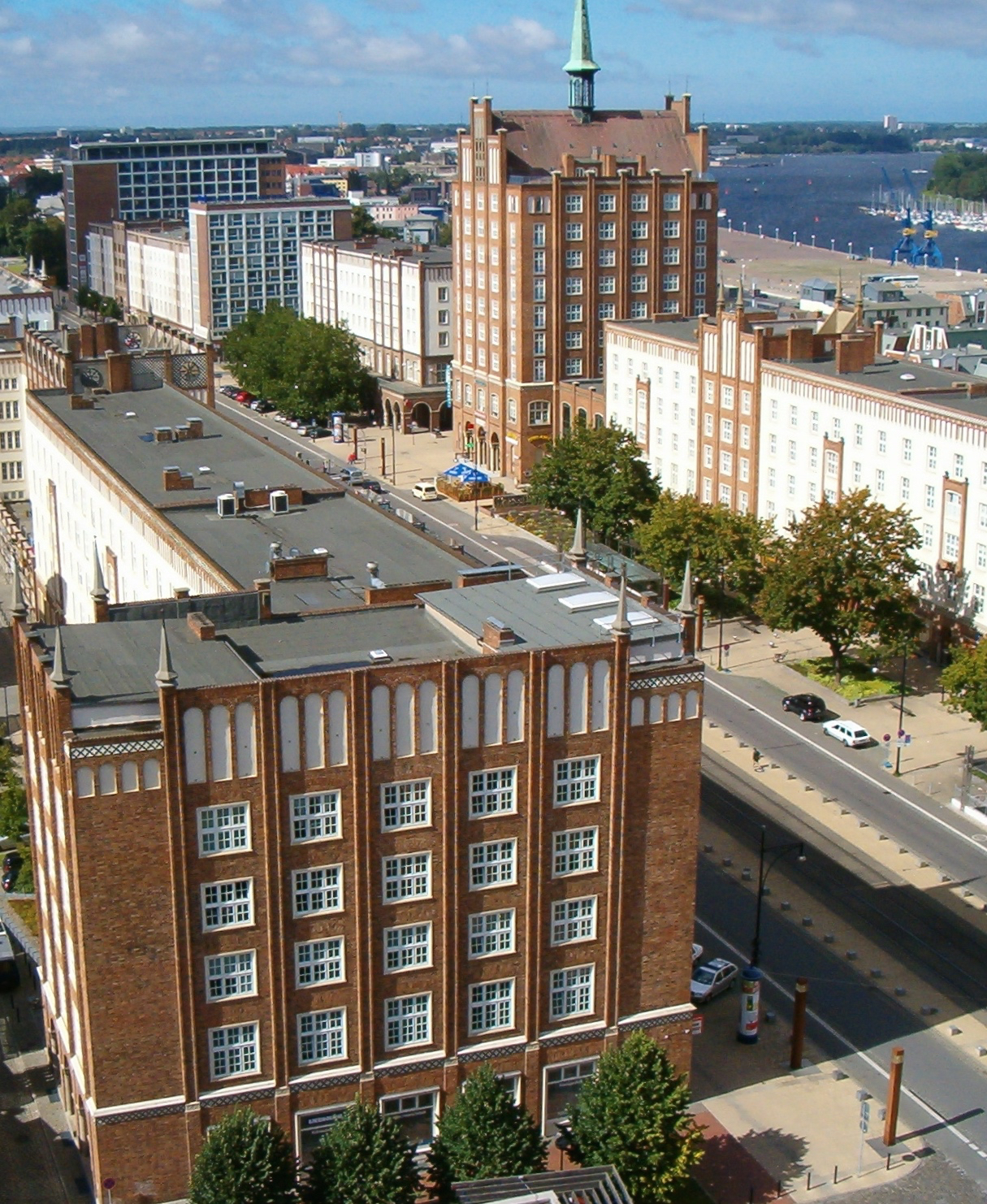 Lange Straße Rostock von St. Marien aus gesehen